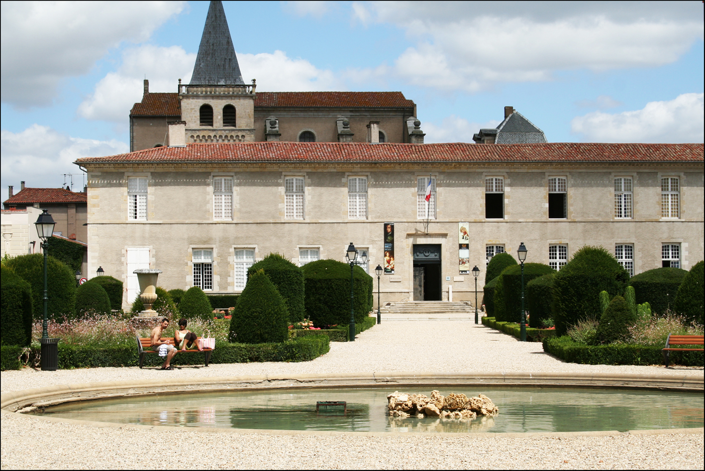 Entrée du musée Goya dans le palais épiscopal de Castres This building is en partie classé, en partie inscrit au titre des Monuments Historiques. .